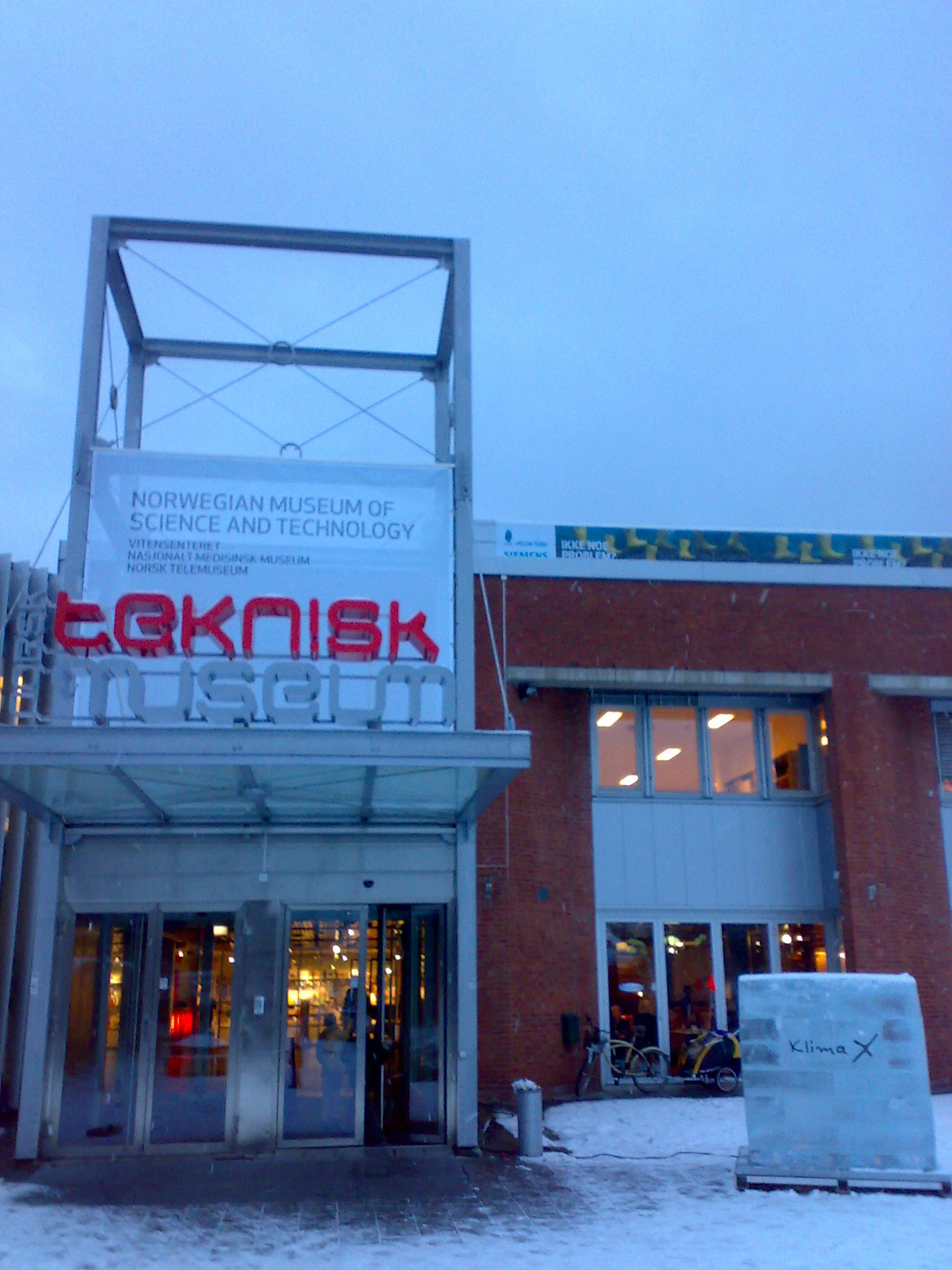 Technical Museum, at Kjelsås in Oslo